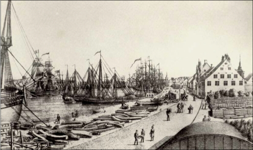 Flensburge, Hafenkai "Schiffbrücke", Copperprint 1833